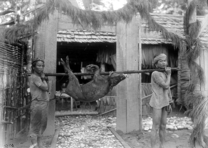 Negatief. Deze foto is gemaakt tijdens de tweede Zuid-Nieuw-Guinea Expeditie van 1909-1910. Dajaks met varken te Alkmaar, tweede Lorentz expeditie